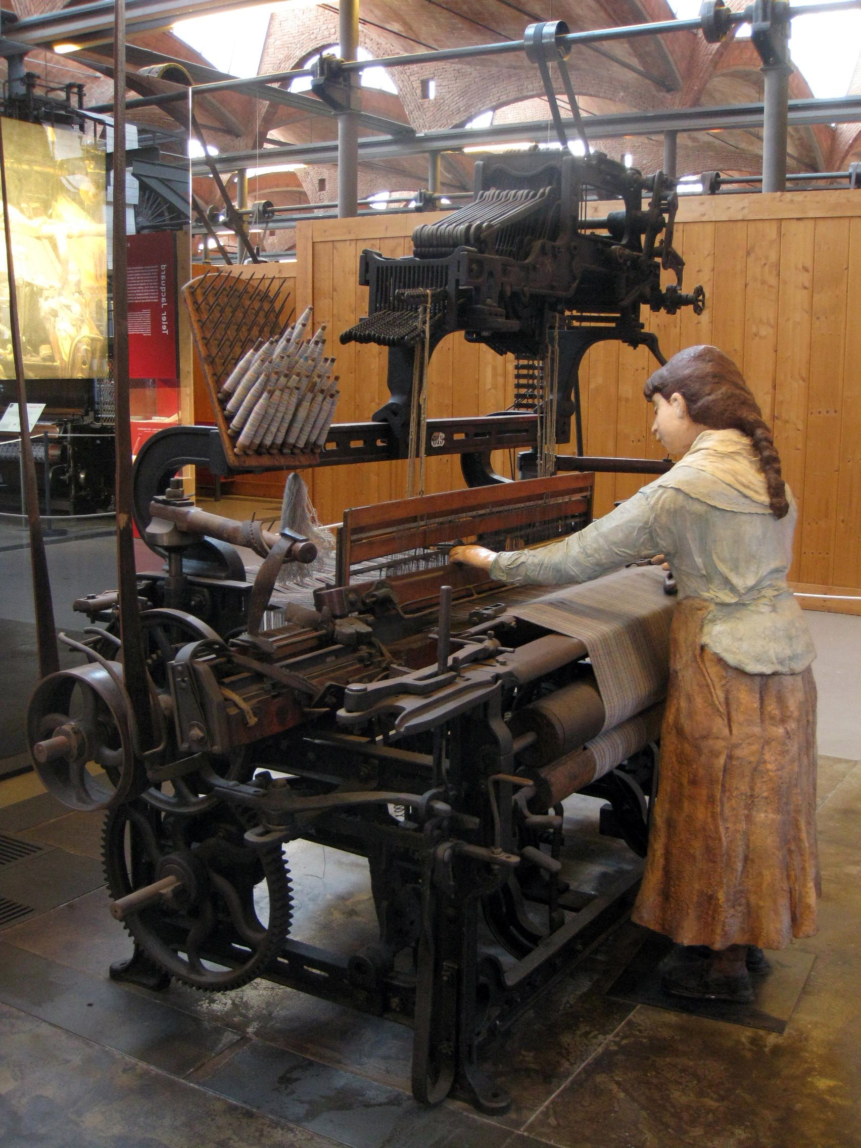 Fàbrica Aymerich, Amat i Jover (Terrassa) Object location41° 33′ 54.49″ N, 2° 00′ 28.14″ E